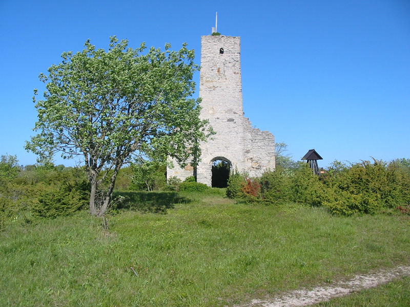 Siim Sepp, 2003